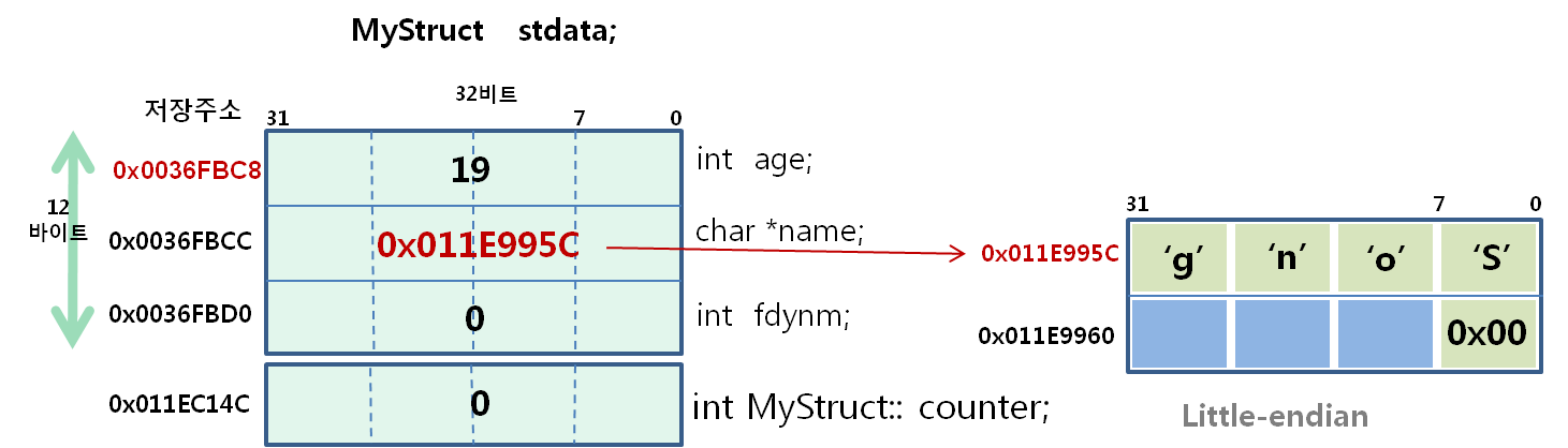 C언어에서 struct 메모리 구조 예